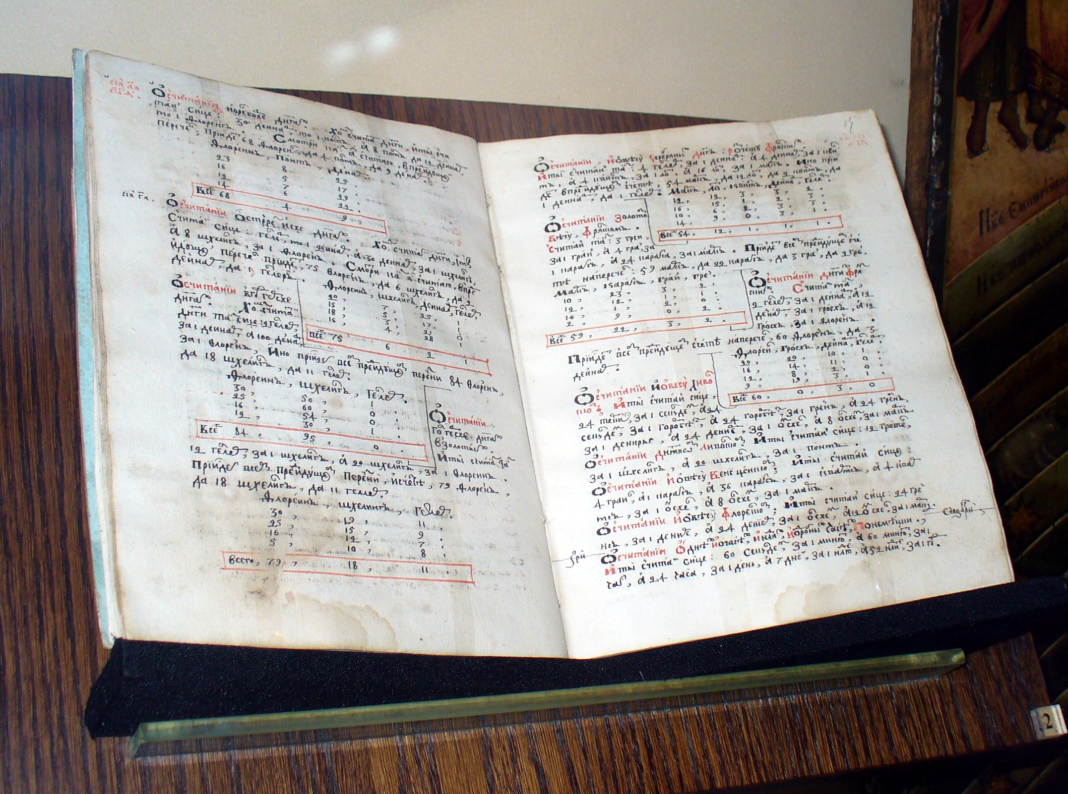 "Цифирная счетная мудрость". Пособие по арифметике современного типа с использованием индоарабских цифр. Россия, вторая половина XVII века.